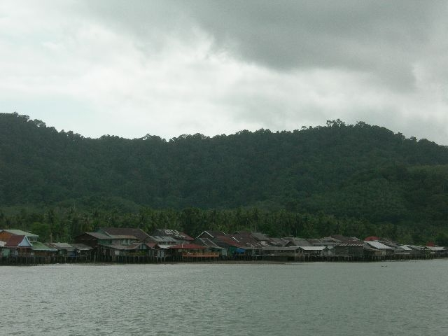 Wioska rybacka na wyspie Lanta